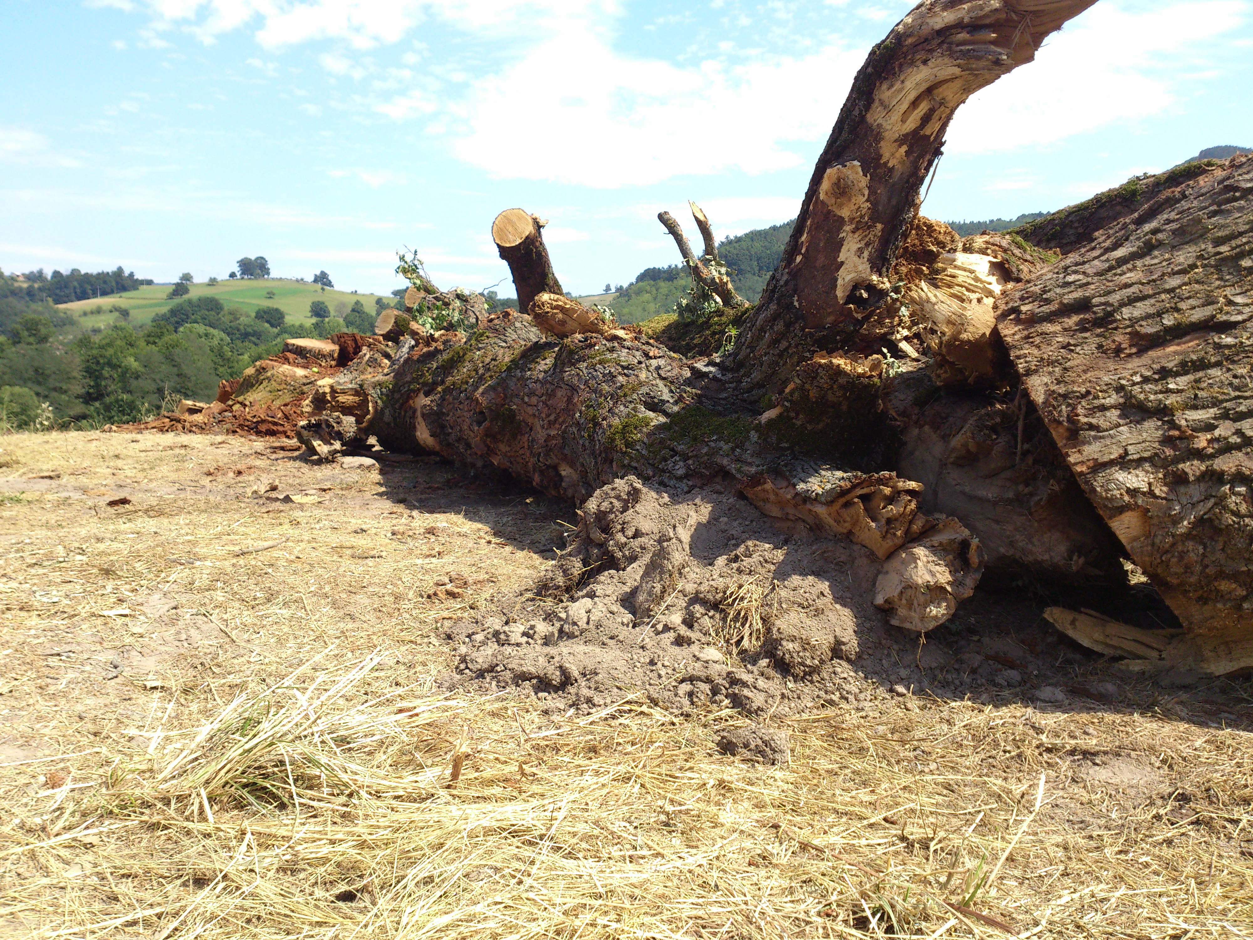 Запис чија је старост процењена на 600 година, у месту Росуље, село Шарани, посечен је 23. јула 2015. године јер се нашао на траси Коридора 11.